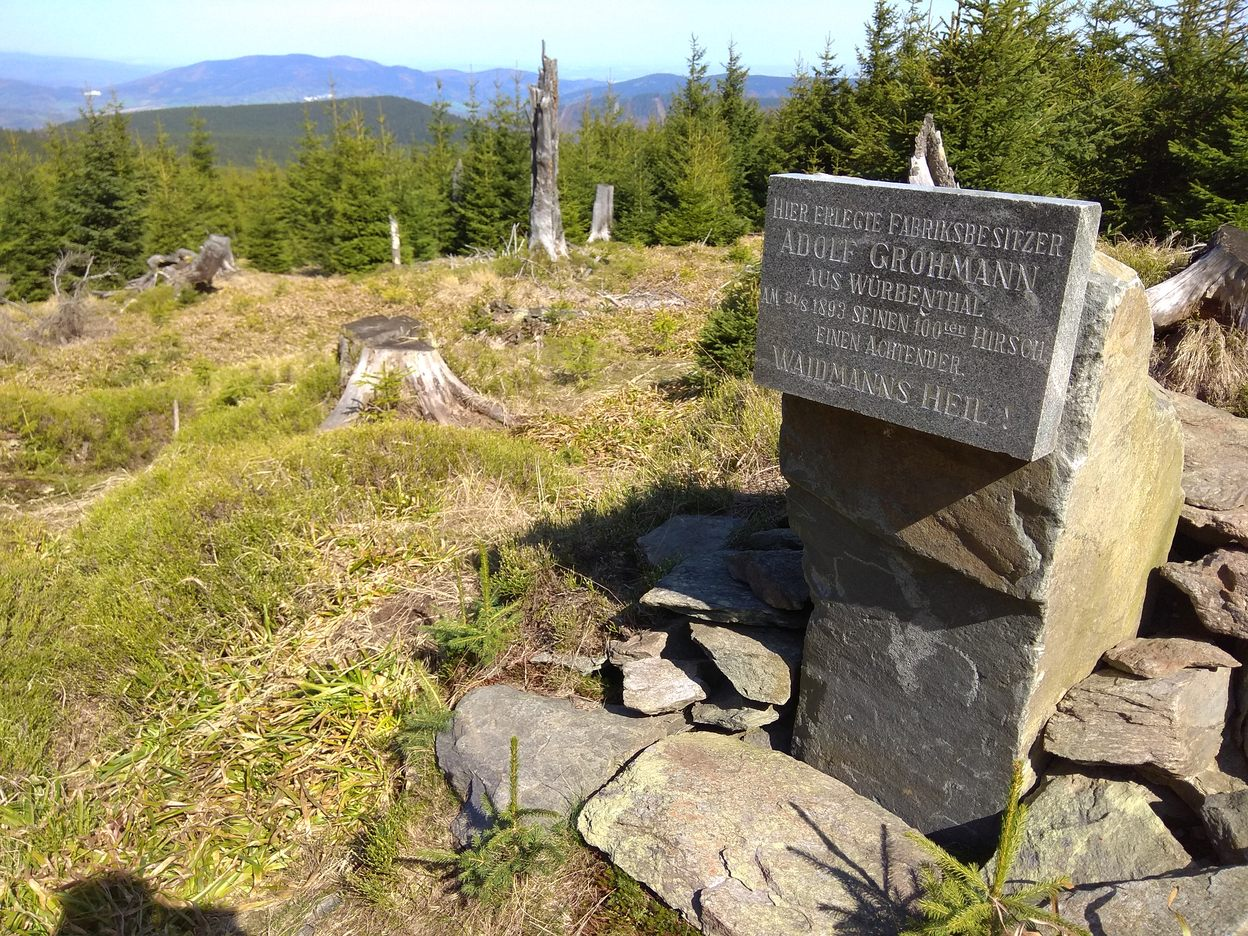 Hier erlegte Fabrikbesitzer Adolf Grohmann aus Würbenthal am 31.8.1893 seinen 100ten Hirsch. Einen Achtender. Waldmanns Heil!